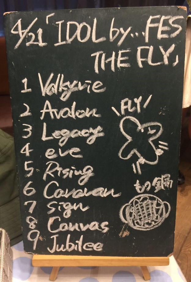 amiinAセトリボード